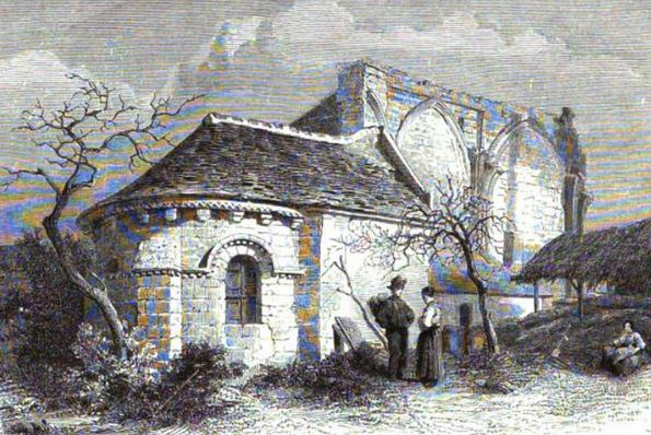 Prieuré de Saint-Cosme, au 19e siècle.